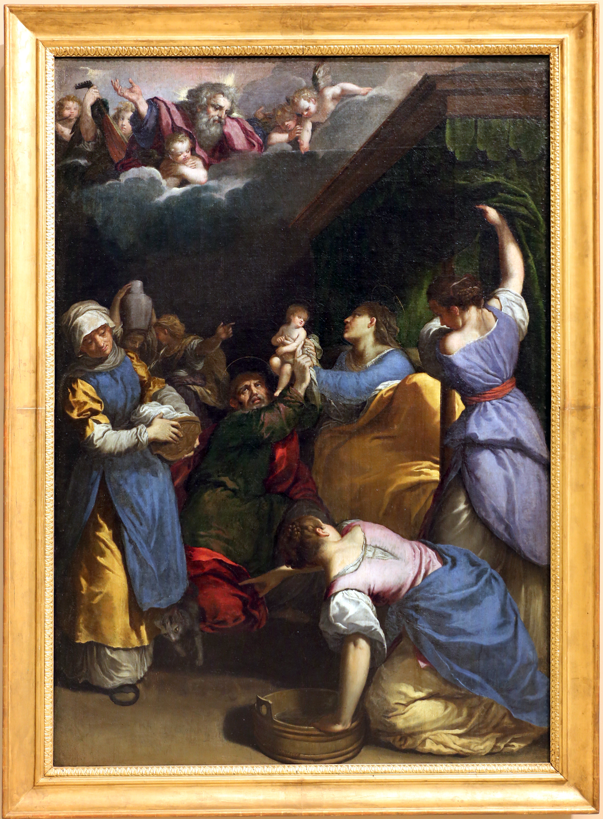 Palazzo dei Musei (Modena) This is a photo of a monument which is part of cultural heritage of Italy.